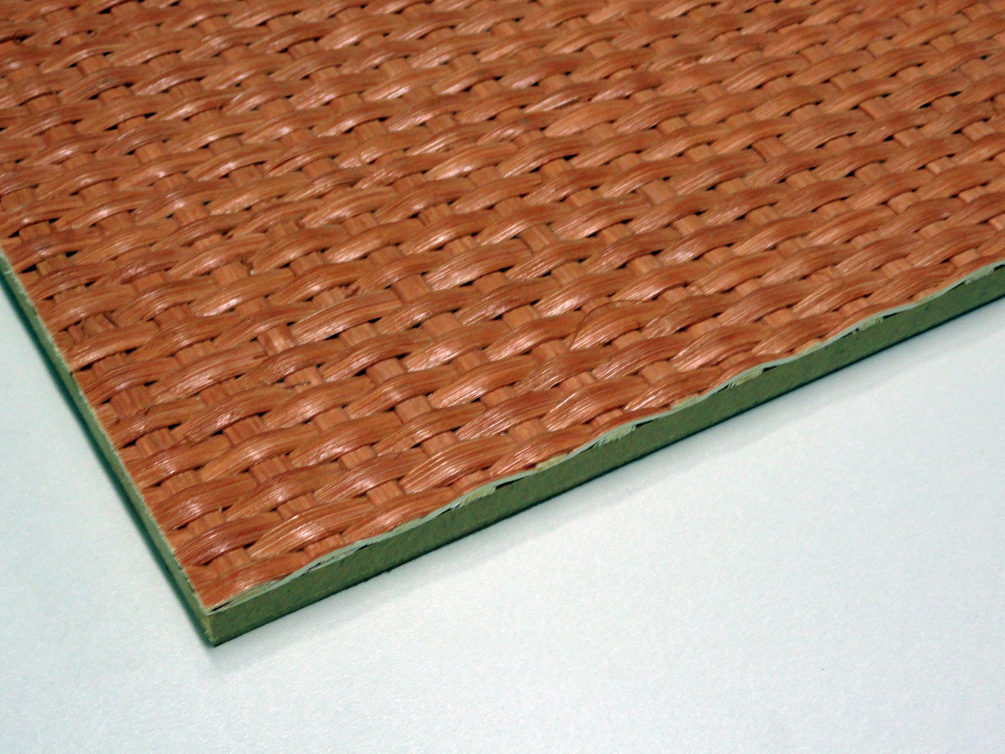 Fibreboard